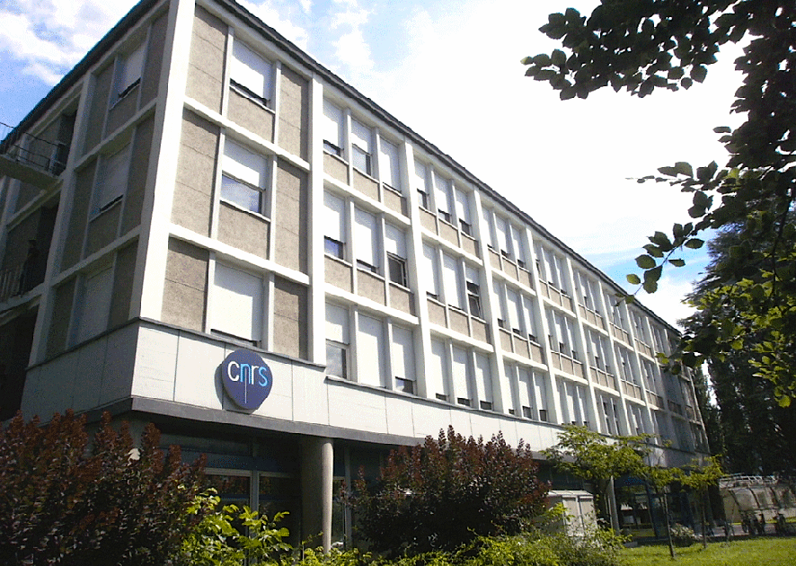 CERMAV - Grenoble - France